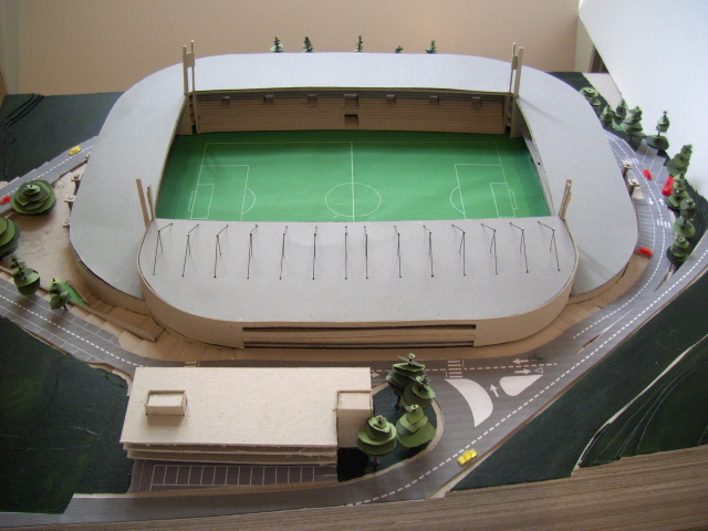 Maquete Estádio